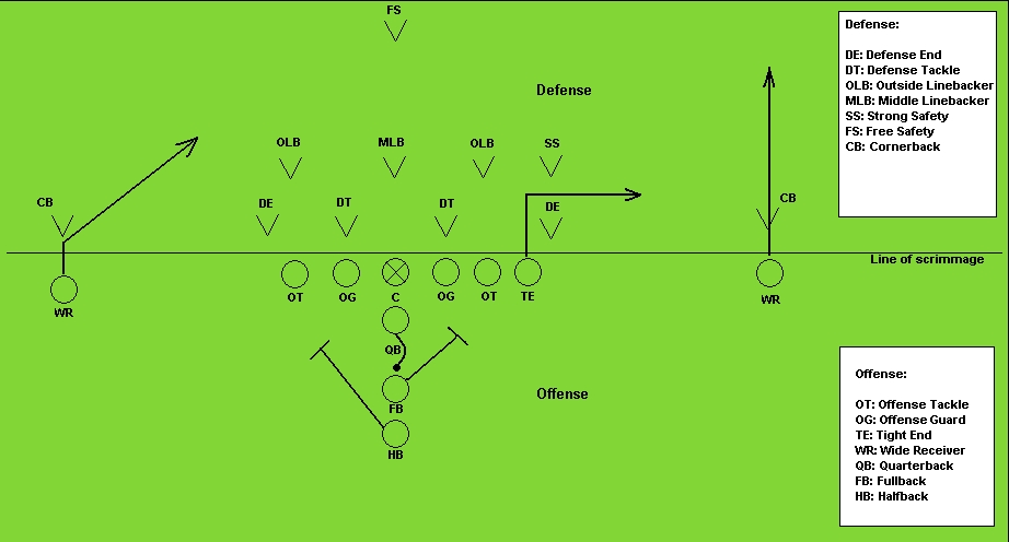 Spielzug aus dem American Football